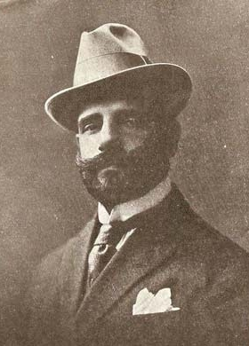 Raul Leal: Antécrist et la Glorie du Saint-Esprit (Frontispiz).